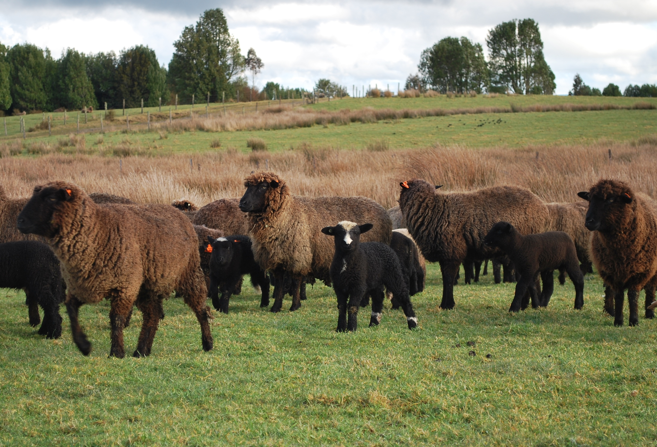 Rebaño de ovejas de raza Chilota tomada en las instalaciones de INIA Butalcura (Chiloé, Chile)